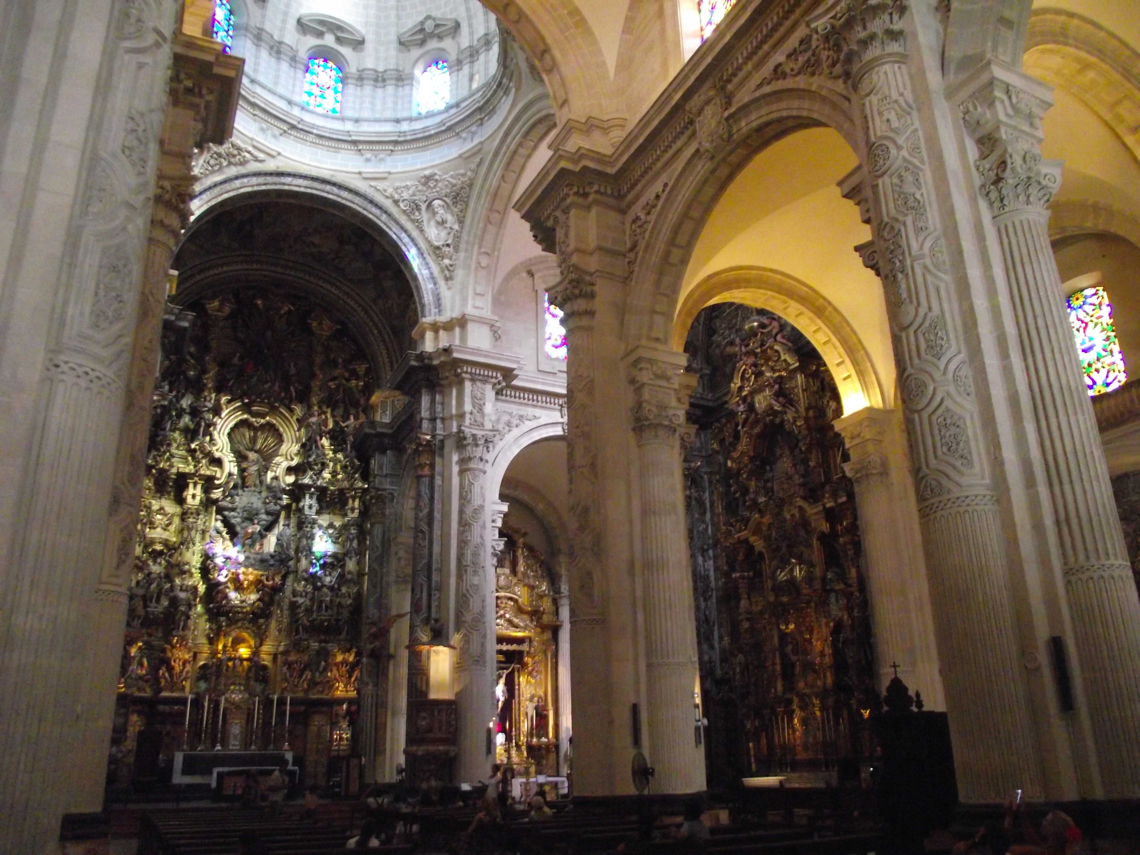 Sevilla, Iglesia del Divin salvador